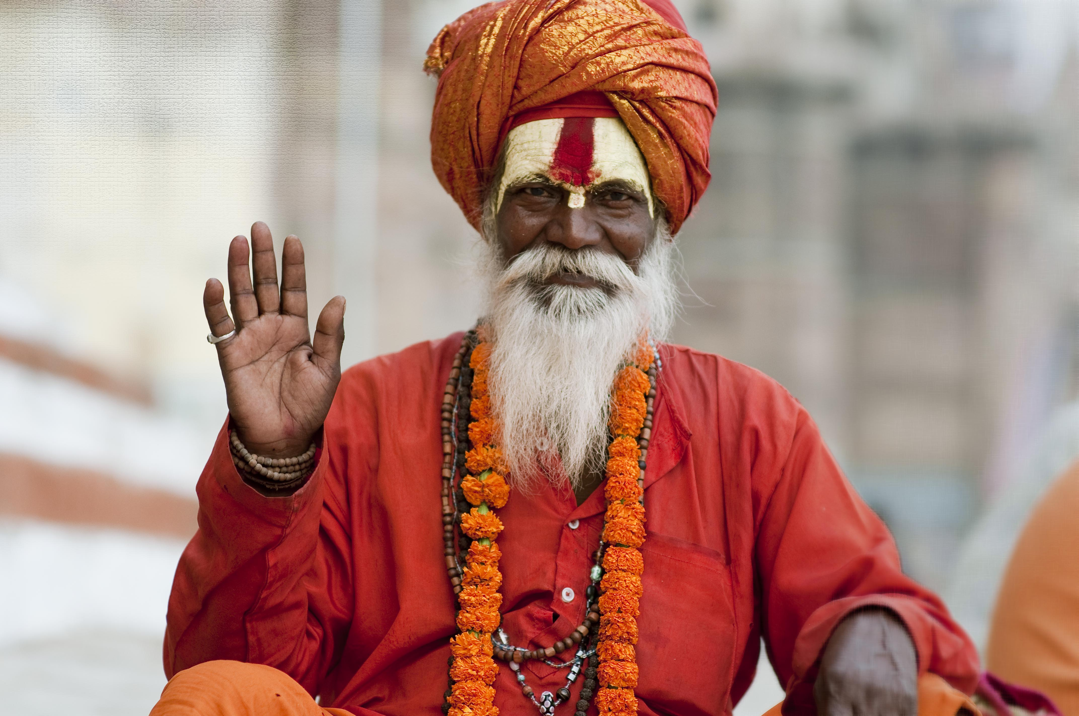 Sadhu India, Hinduism